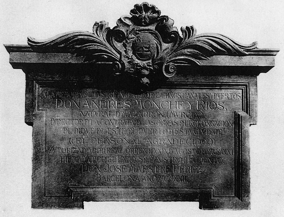 Foto de la lápida colocada en el dique del Este del puerto de Barcelon en 1924 (o 1922 segun se lee en la placa).